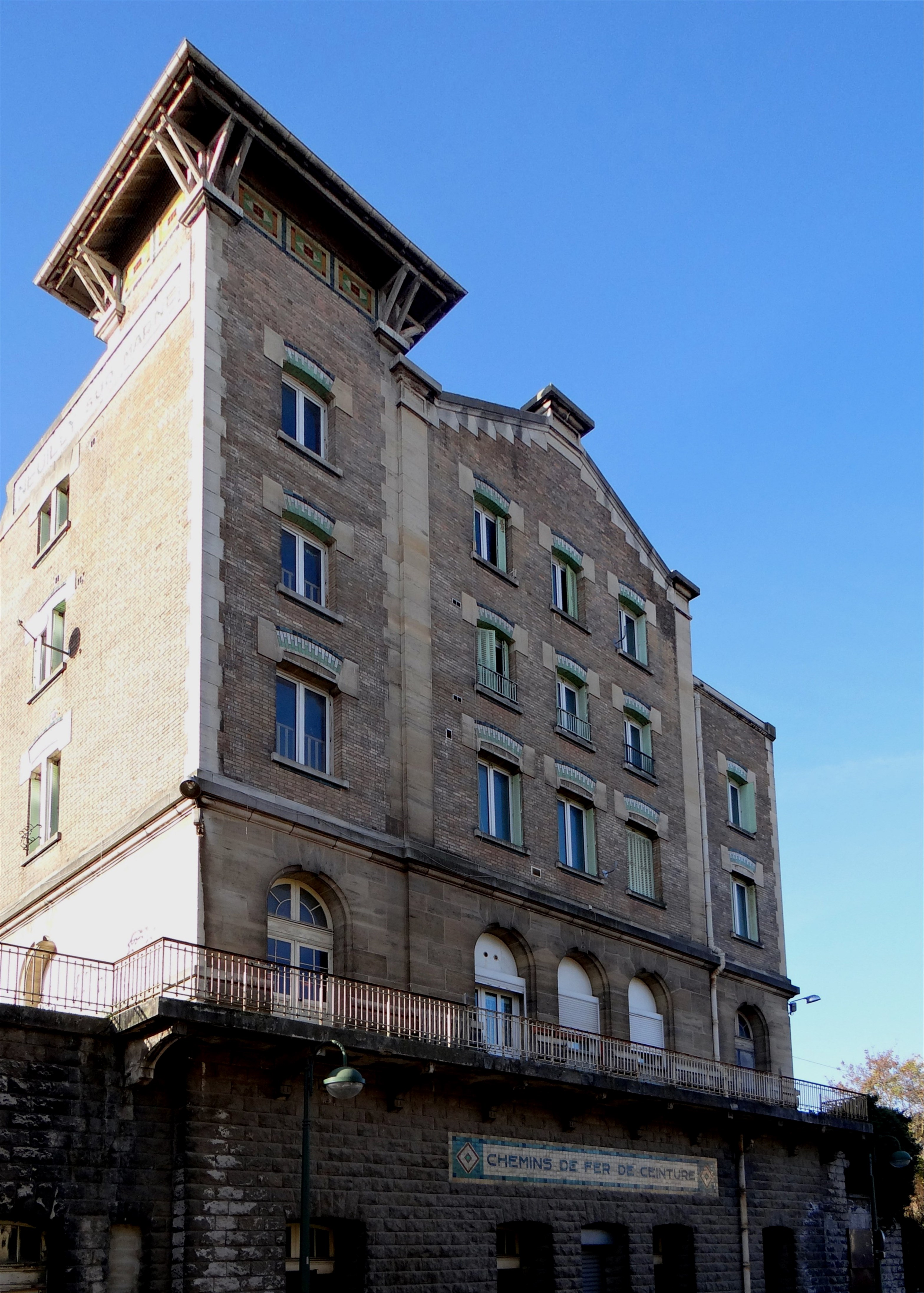 Ancienne gare SNCF de Neuilly-sur-Marne, Seine-Saint-Denis, France.